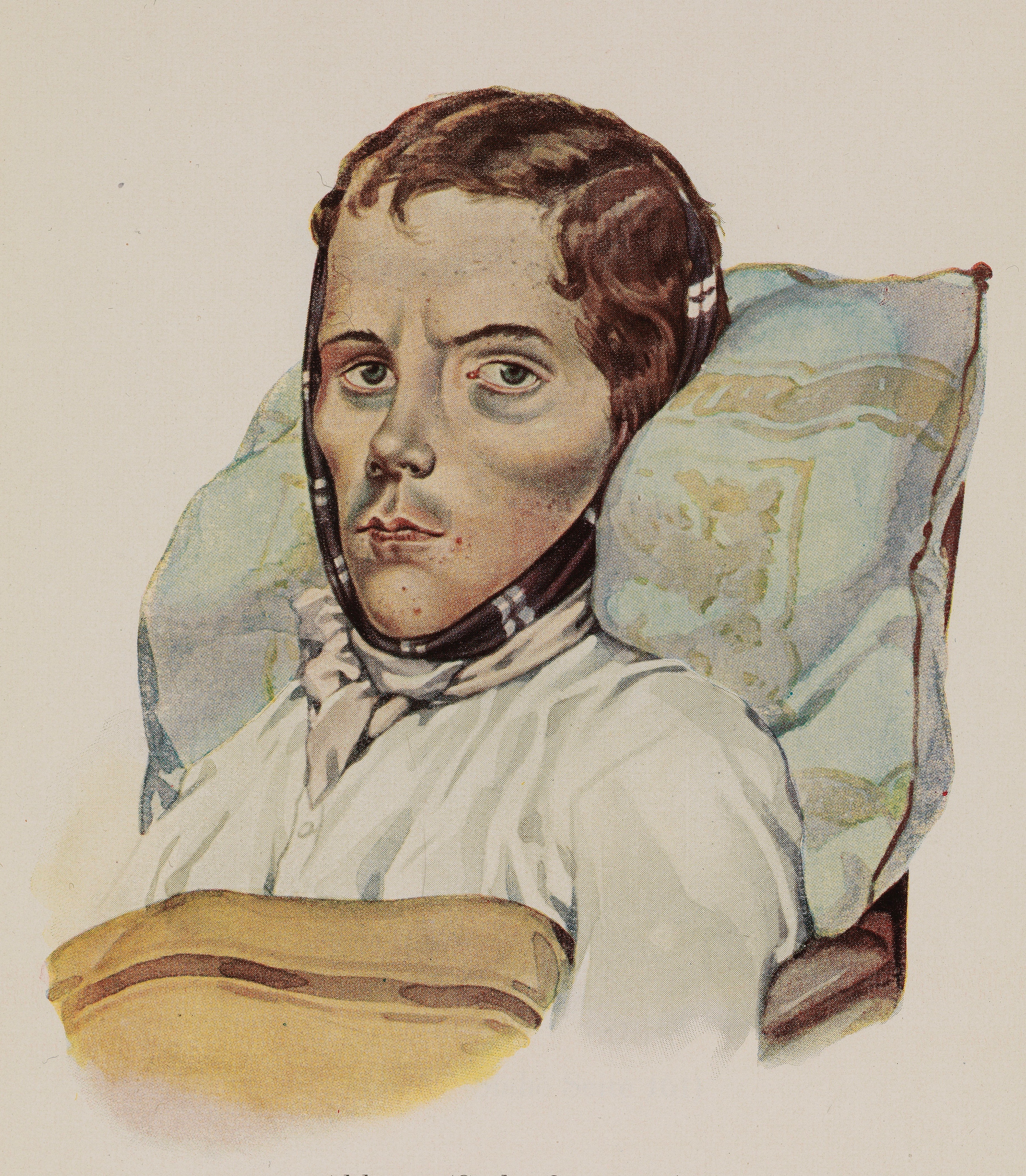 Schwindsüchtiger. Handkolorierte Lithografie von Karl Sandhaas (1801–1859) aus dem Atlasband von Karl Heinrich Baumgärtner (1798–1886): Physiognomice pathologica – Krankenphysiognomik, (Stuttgart 1839), Abbildung 32.